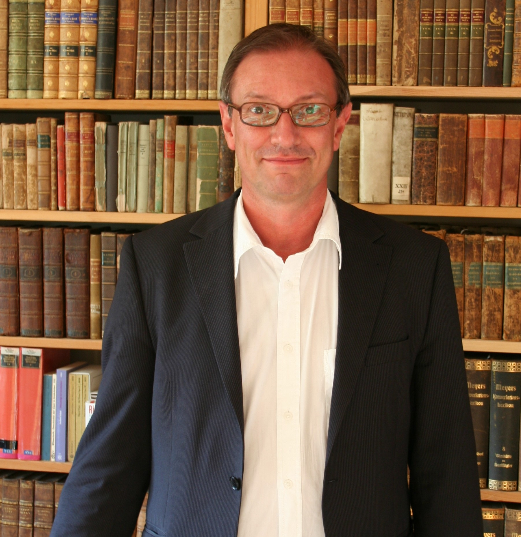 Achim Hölter vor Büchern